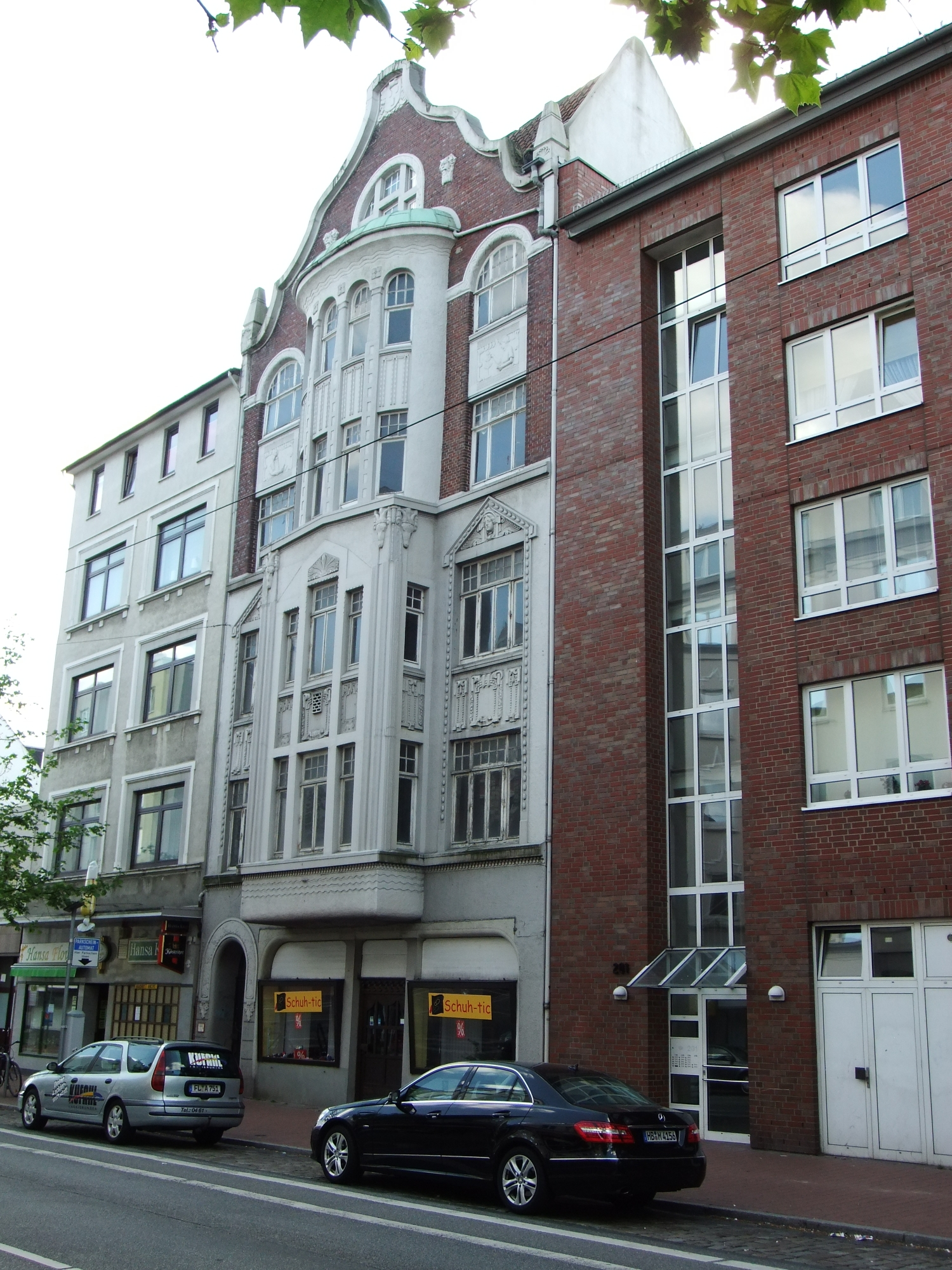 Wohnhaus in Bremerhaven, Hafenstraße 199. Das abgebildete Objekt ist ein geschütztes Kulturdenkmal in der Freien Hansestadt Bremen, mit der Nr. 1574 beim Landesamt für Denkmalpflege registriert.